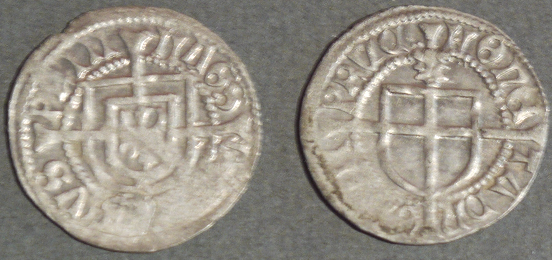 Szelągi z czasów Ludwiga von Erlichshausena ze zbiorów gabinetu numizmatycznego w Malborku.